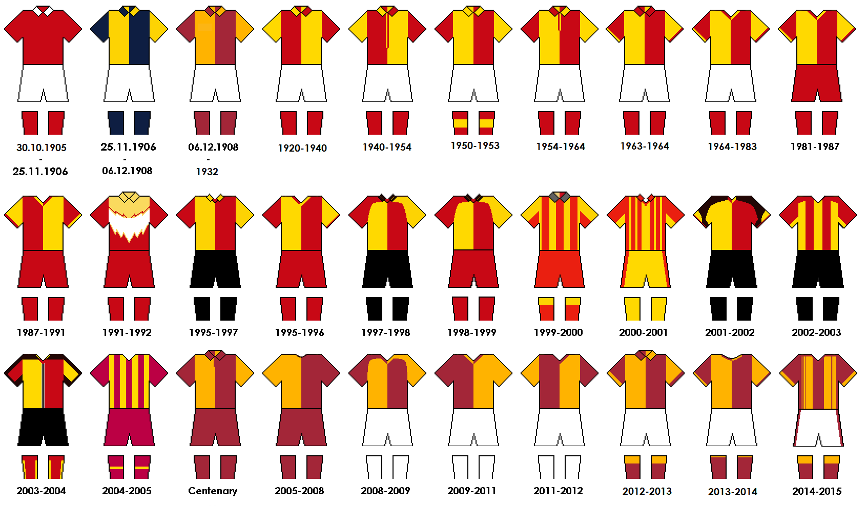 GalatasarayKitHistoryupdateJuly2014